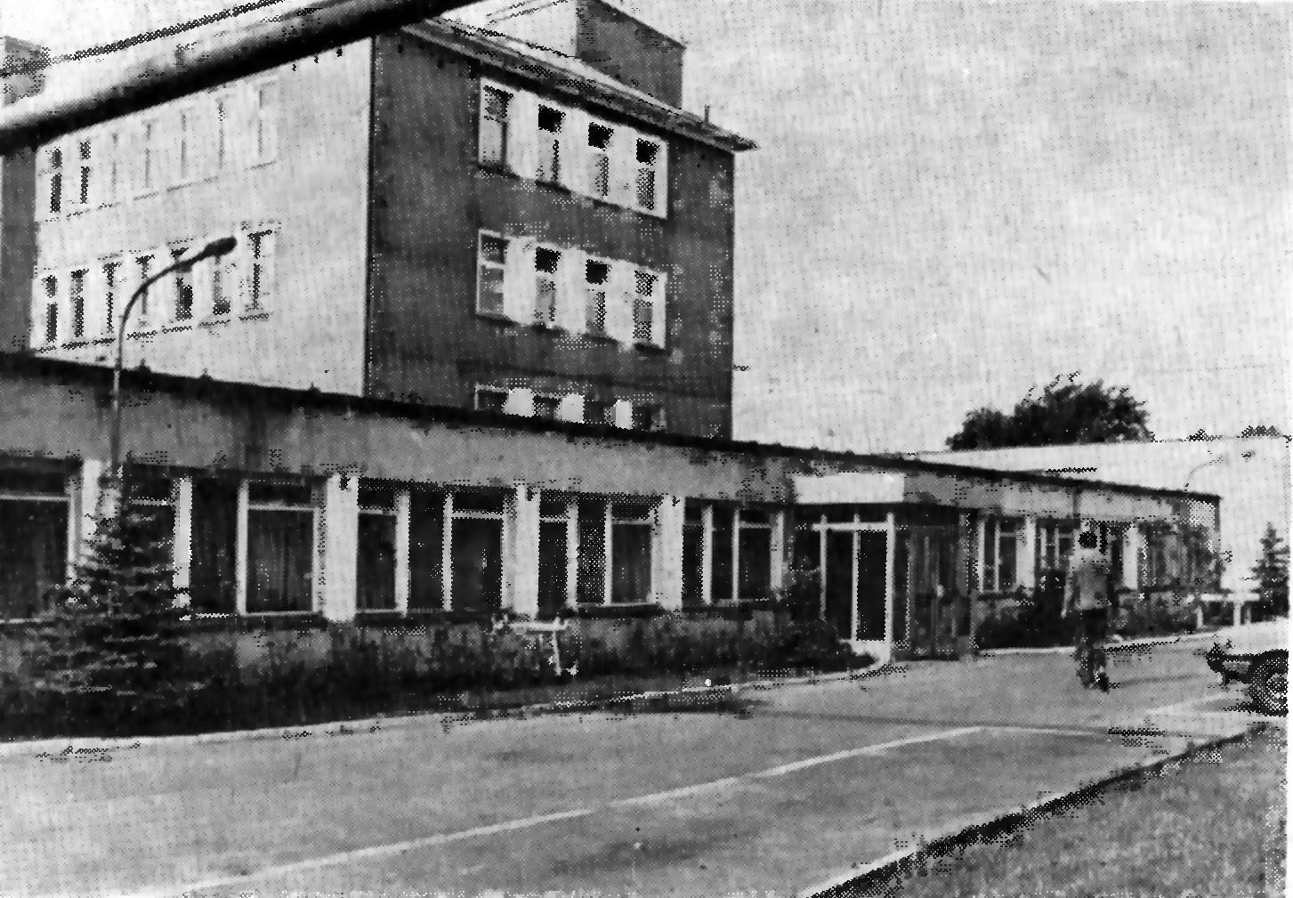 Stomil Poznań, Starołecka